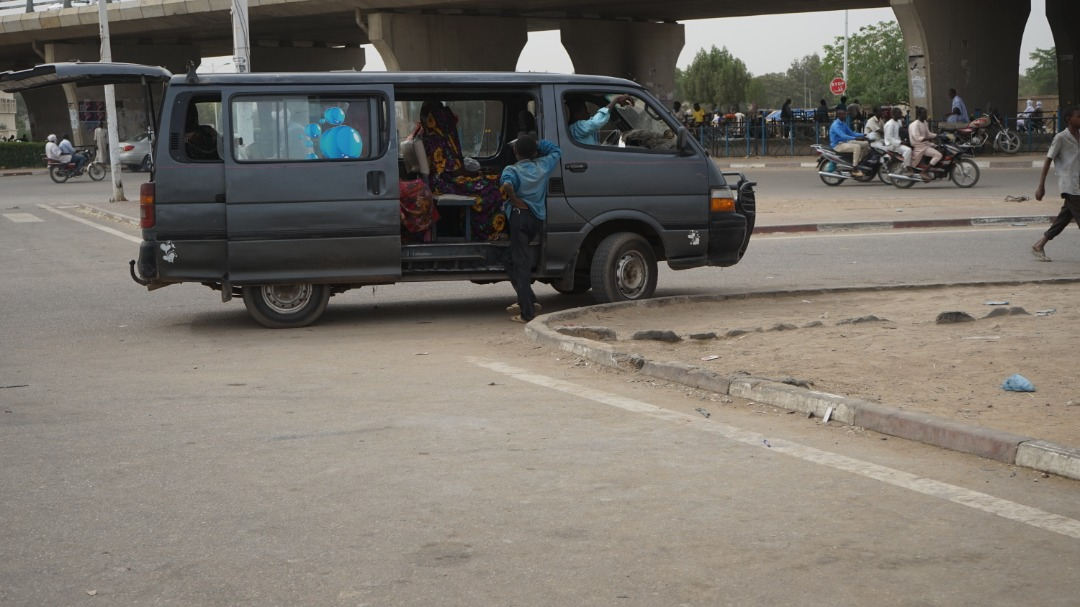 Transport de personnes venant du Marché à mil vers le quartier N'Djari. This is an image with the theme "Africa on the Move or Transport" from: Chad